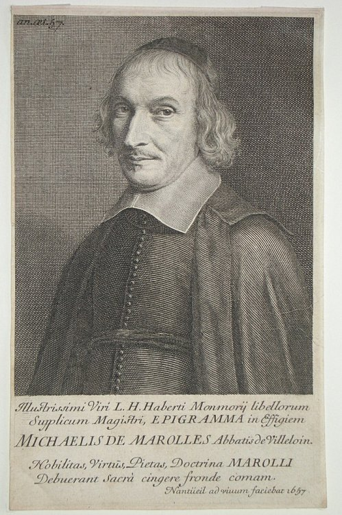 Michaelis de Marolles - Abbatis de Villeloin.